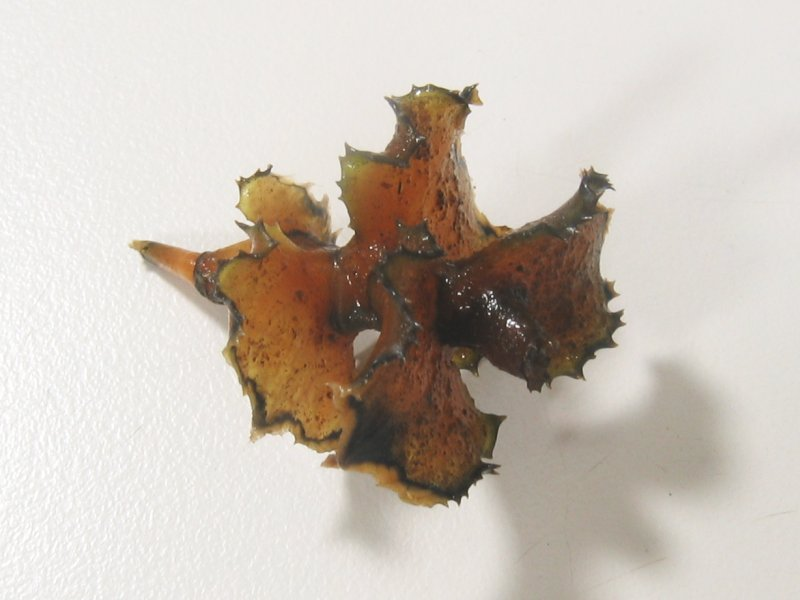 Überdauerungsform (Knospe) von Potamogeton cripsus, Müritz-Gebiet